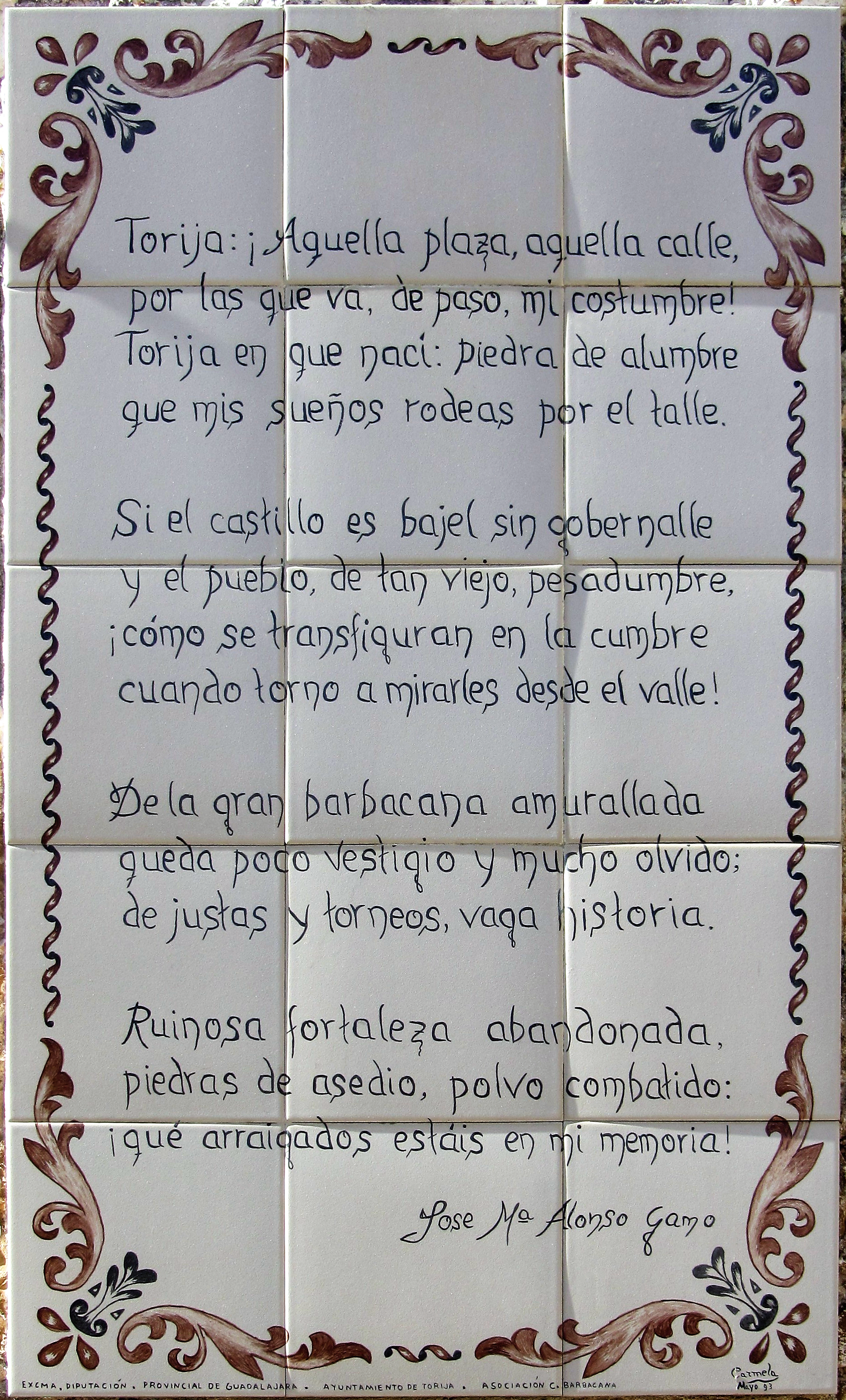 Azulejos con un poema de José María Alonso Gamo dedicado a Torija, su pueblo natal. Se localiza en la pared del ábside que da a la Plazuela de la Iglesia. Diseñado por "Carmela" en mayo de 1993.